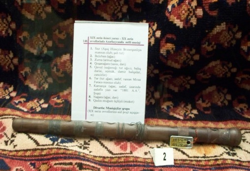 Балабан - азербайджанский национальный музыкальный инструментAzərbaycanca: Balaban- Azərbaycan milli müsiqi aləti